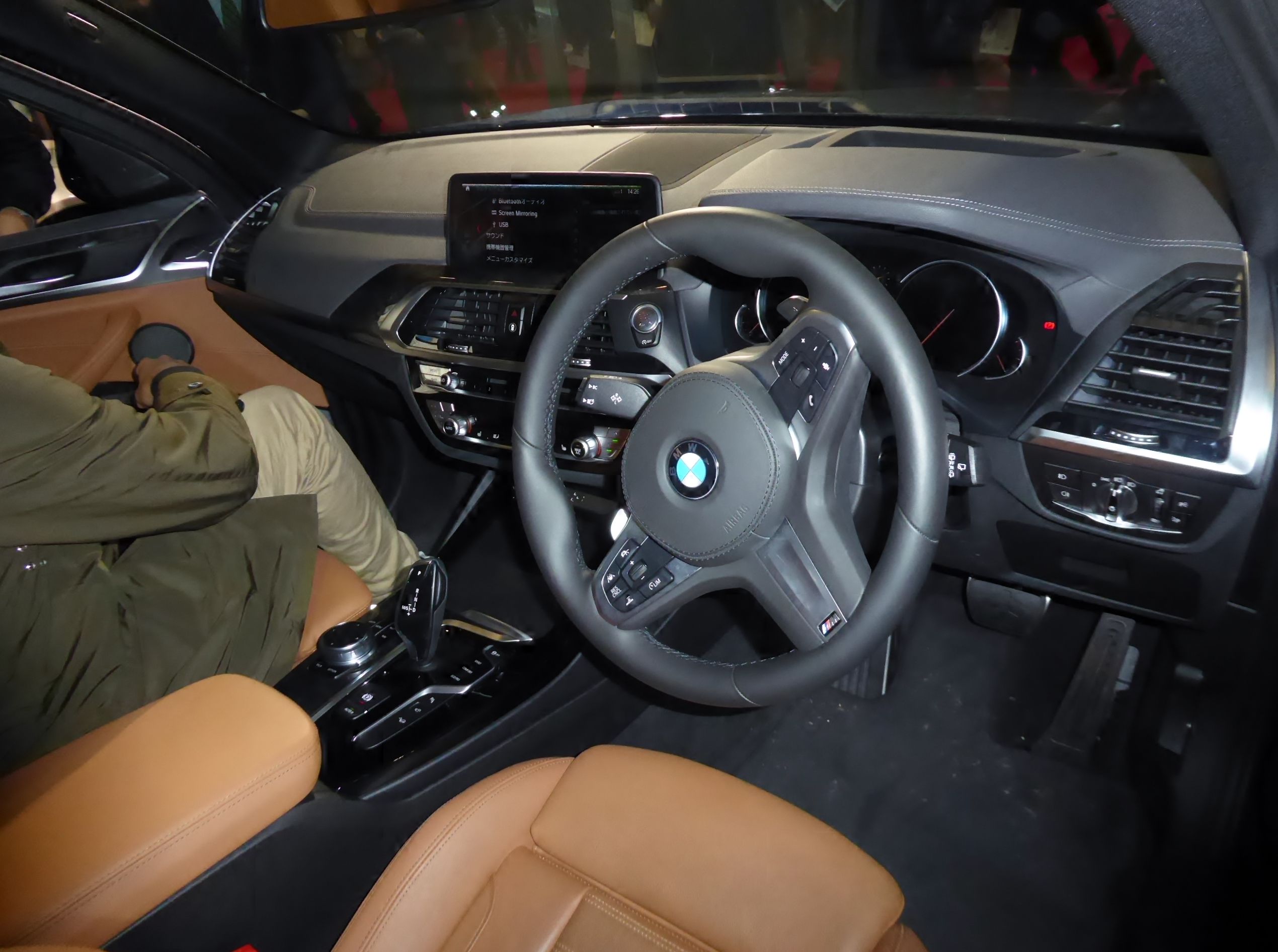 大阪モーターショー2017に於いてG01系BMW・X3 xDrive20d M Sportを撮影。